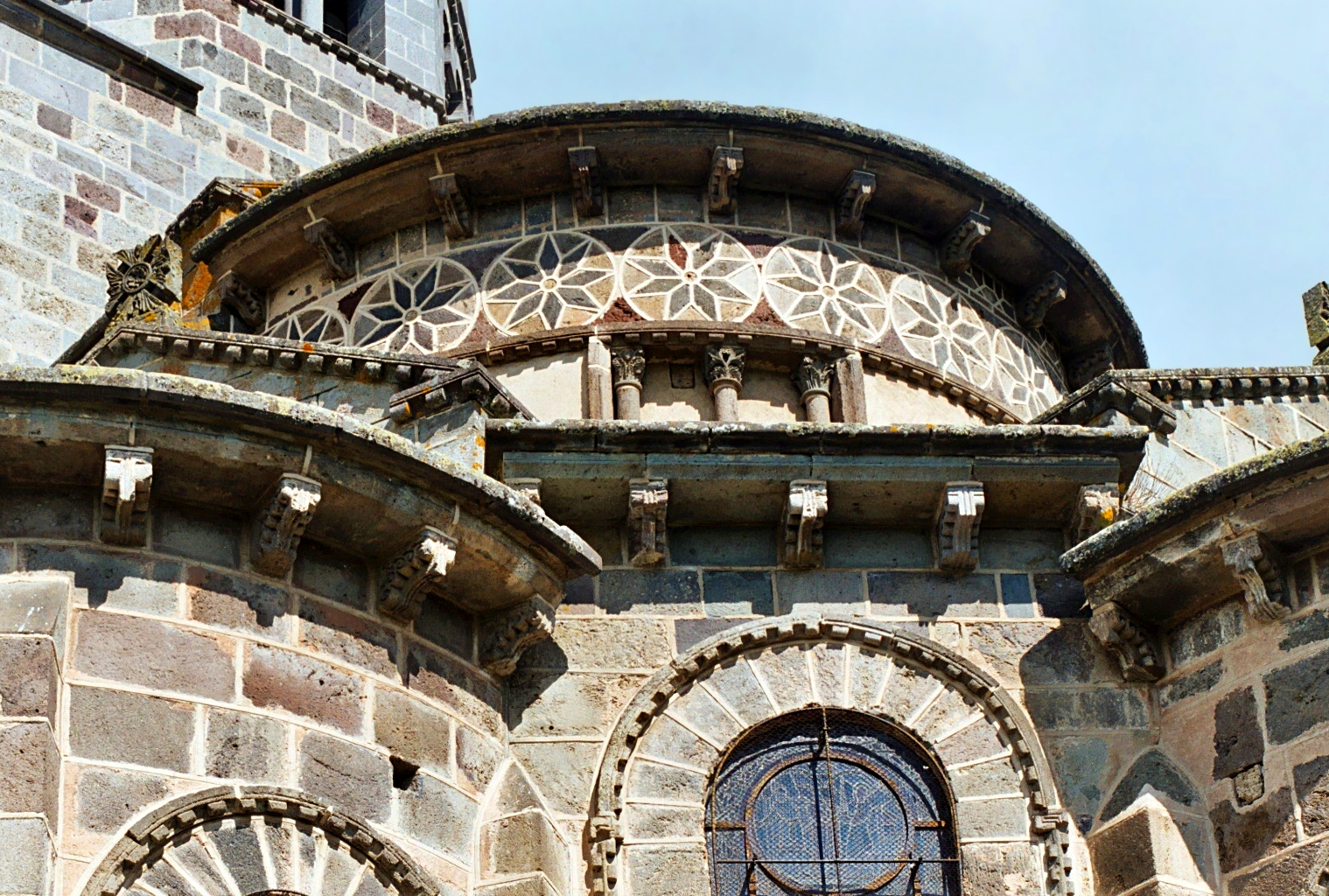 France - Auvergne - Puy-de-Dôme - Église de Saint-Nectaire